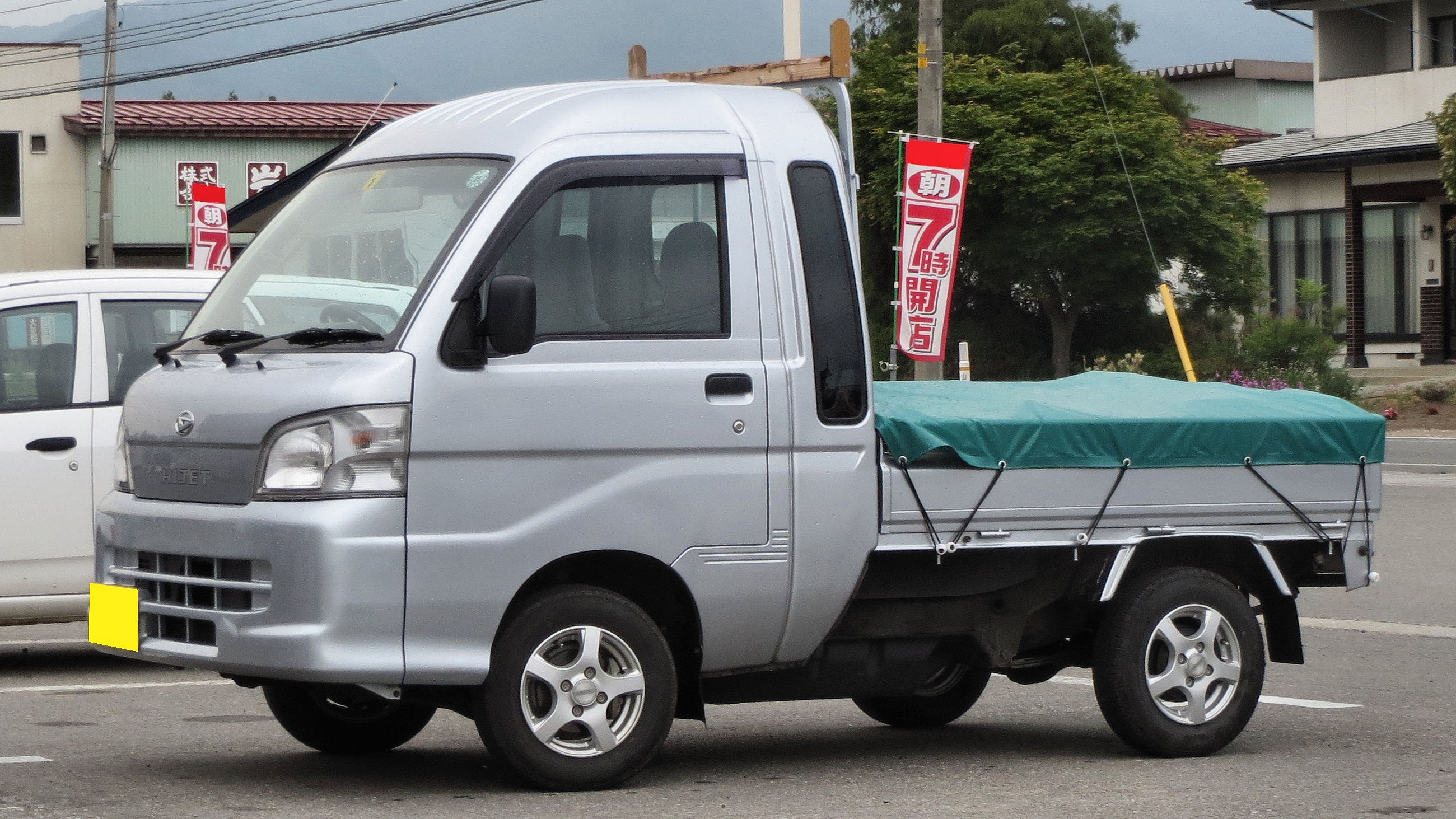 ダイハツハイゼットジャンボ 4WD 5MT